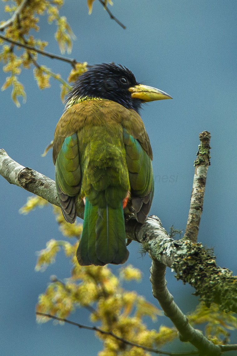 Great Barbet - Bhutan_S4E0428